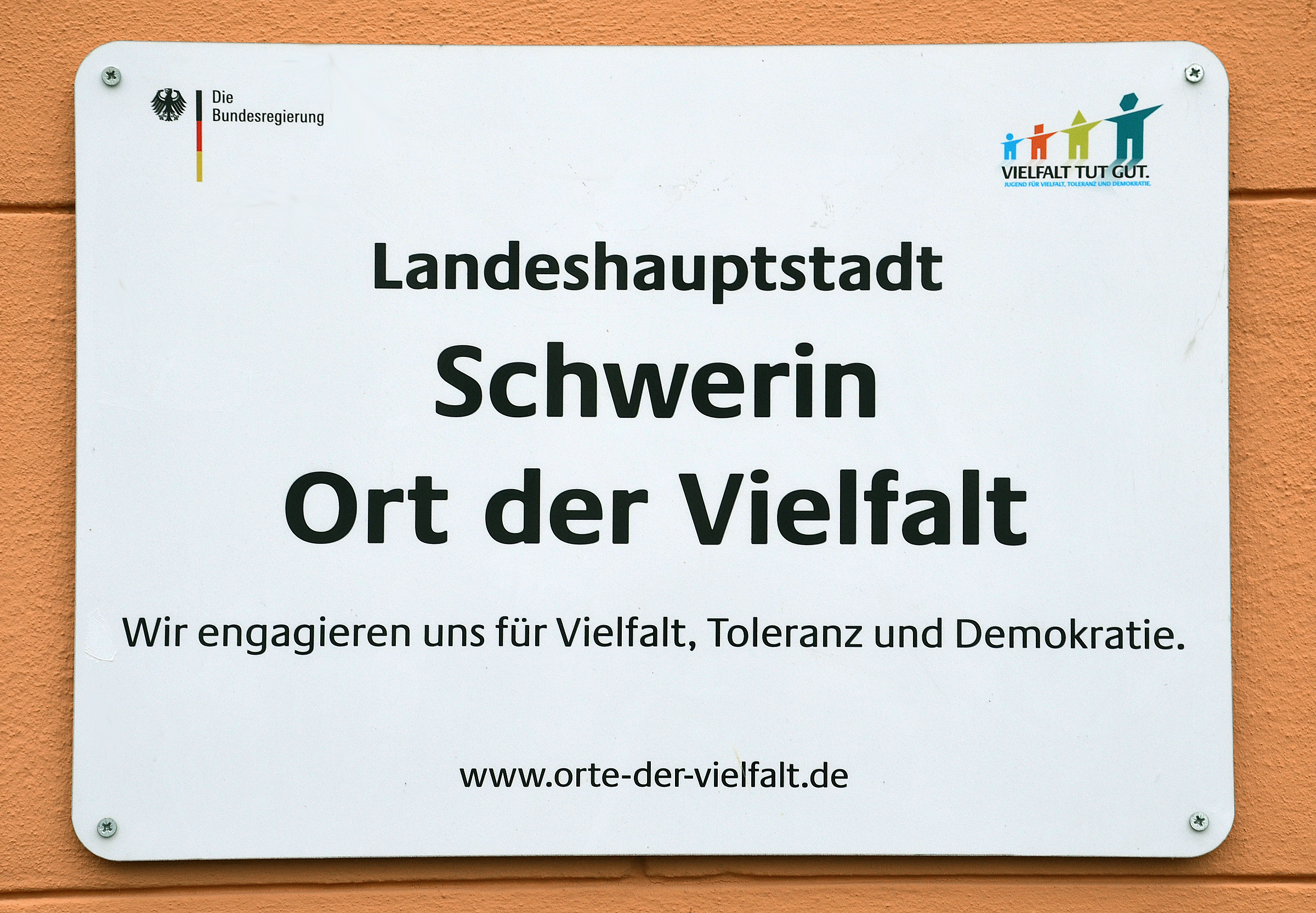 Tafel an der Fassade des Altstädtischen Rathauses in Schwerin als Hinweis der durch die Deutsche Bundesregierung verliehenen Auszeichnung. Unter dem Logo des Bundesprogrammes „Vielfalt tut gut - Jugend für Vielfalt, Toleranz und Demokratie“ findet sich in größerer Schrift der Text „Landeshauptstadt // Schwerin // Ort der Vielfalt // Wir engagieren uns für Vielfalt, Toleranz und Demokratie.“ sowie die Internet-Adresse ' Das Foto wurde aufgenommen am 2. November 2015 nach dem von verschiedenen Wikipedianern veranstalteten Arbeitstreffen Wikipedia:WikiDACH 2015 im Schweriner Schloss ...